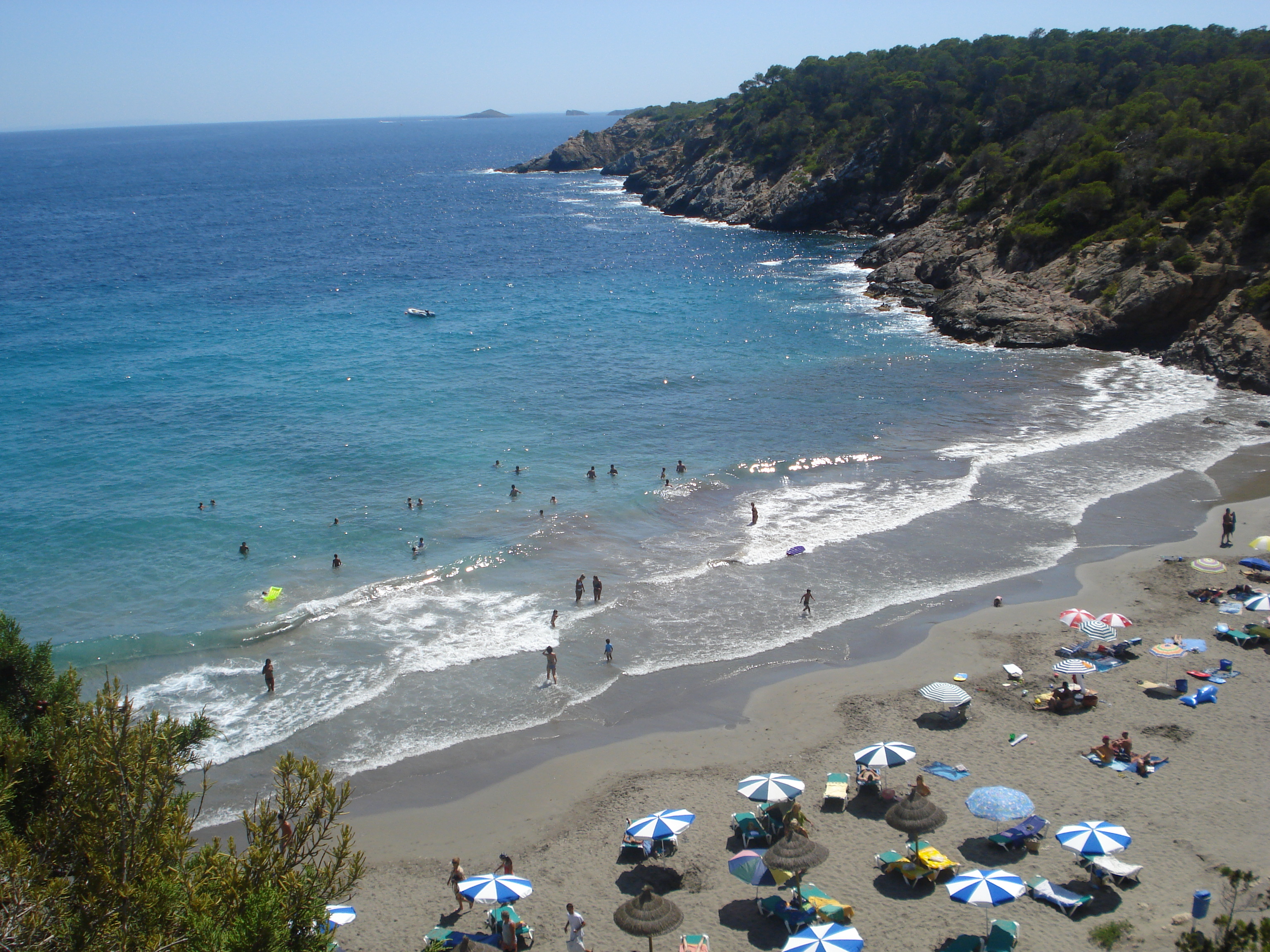 Cala del nordest de l'Illa d'Eivissa